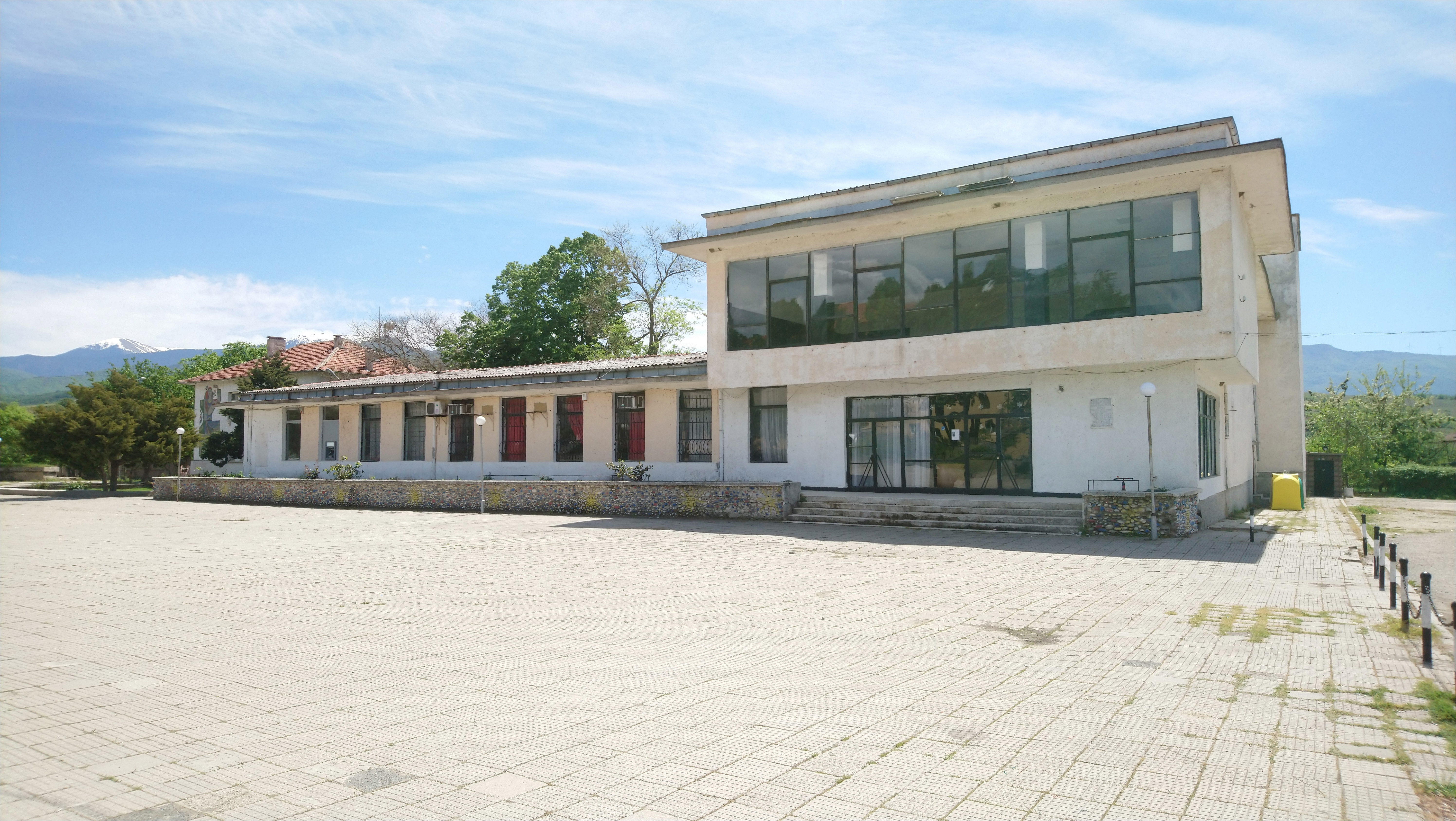 Читалище Просвета 1935, село Катунци